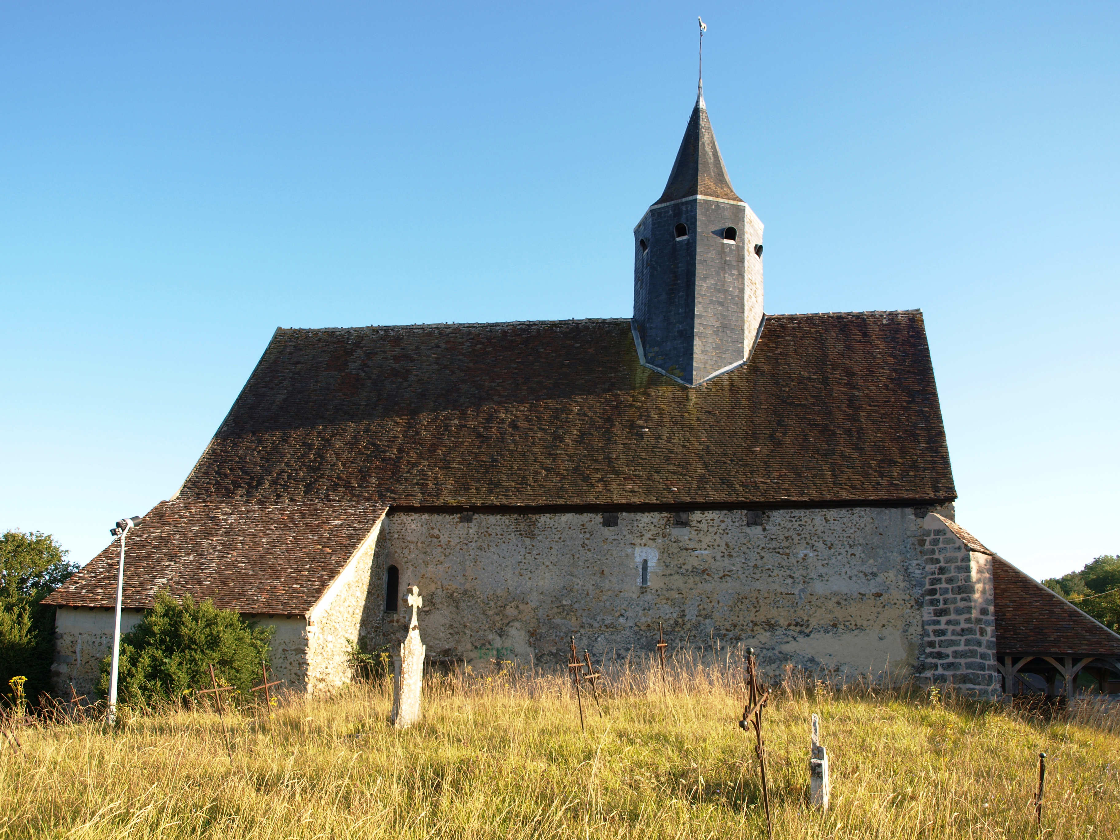 Saint-Romain-le-Preux (Yonne, France) ; l'église